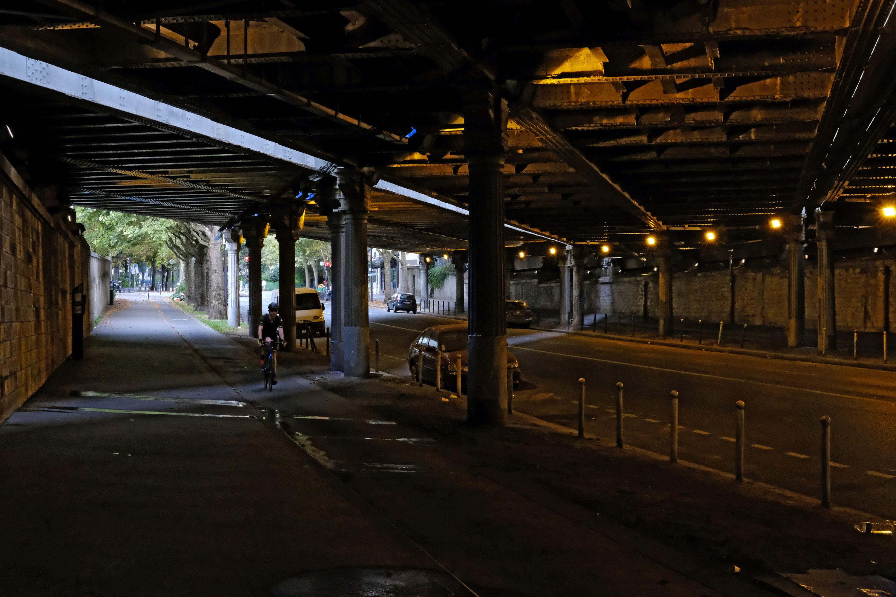 Boulevard de Bercy (passage sous les voies SNCF de la gare de Paris-Lyon) - Paris XII